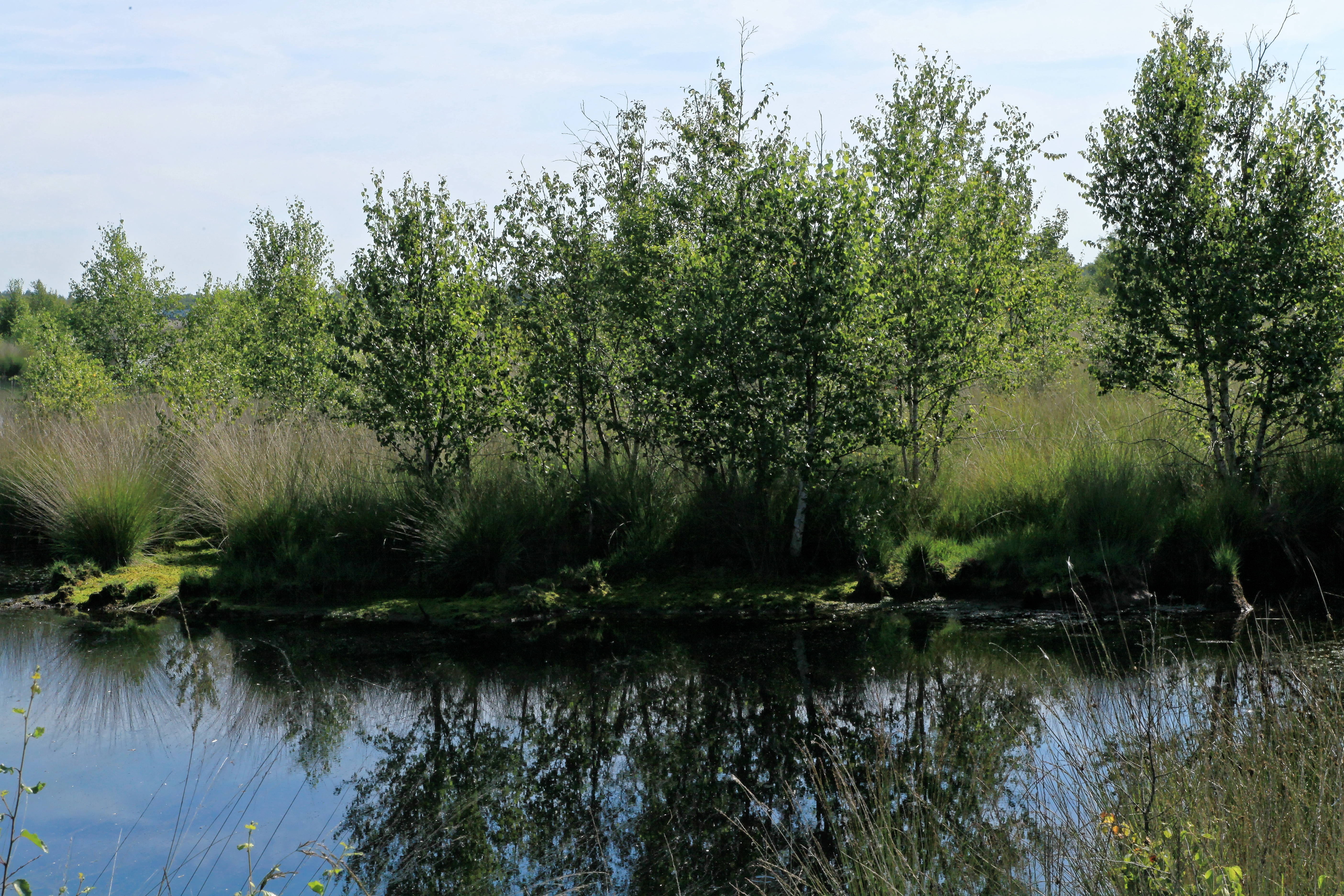 NSG Geestmoor, Twister Straße in Geeste